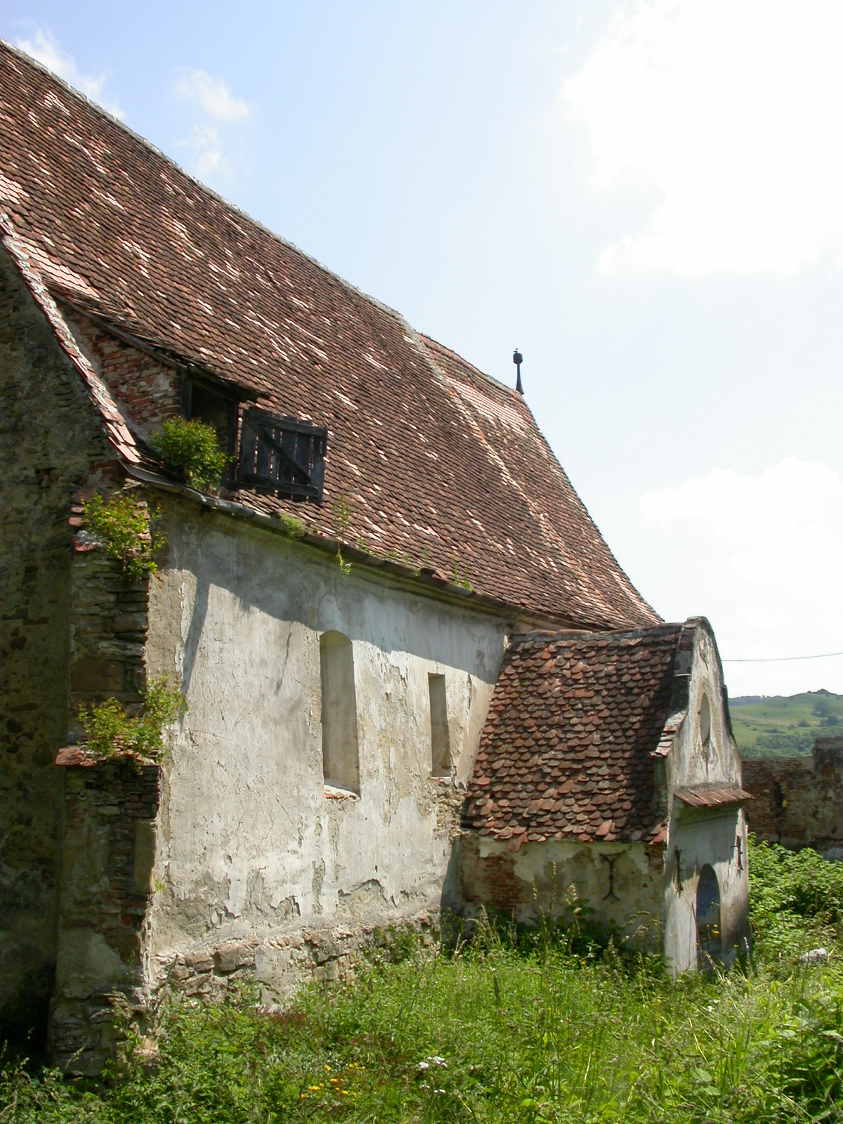 Ansamblul bisericii evanghelice fortificate, sec. XV - XVIII